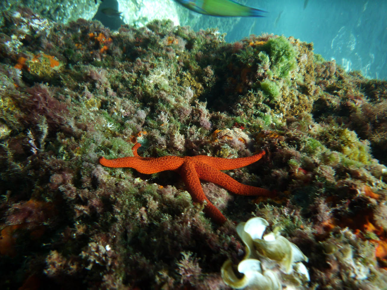 Echinaster sepositus en El Portús (Cartagena-Spain)